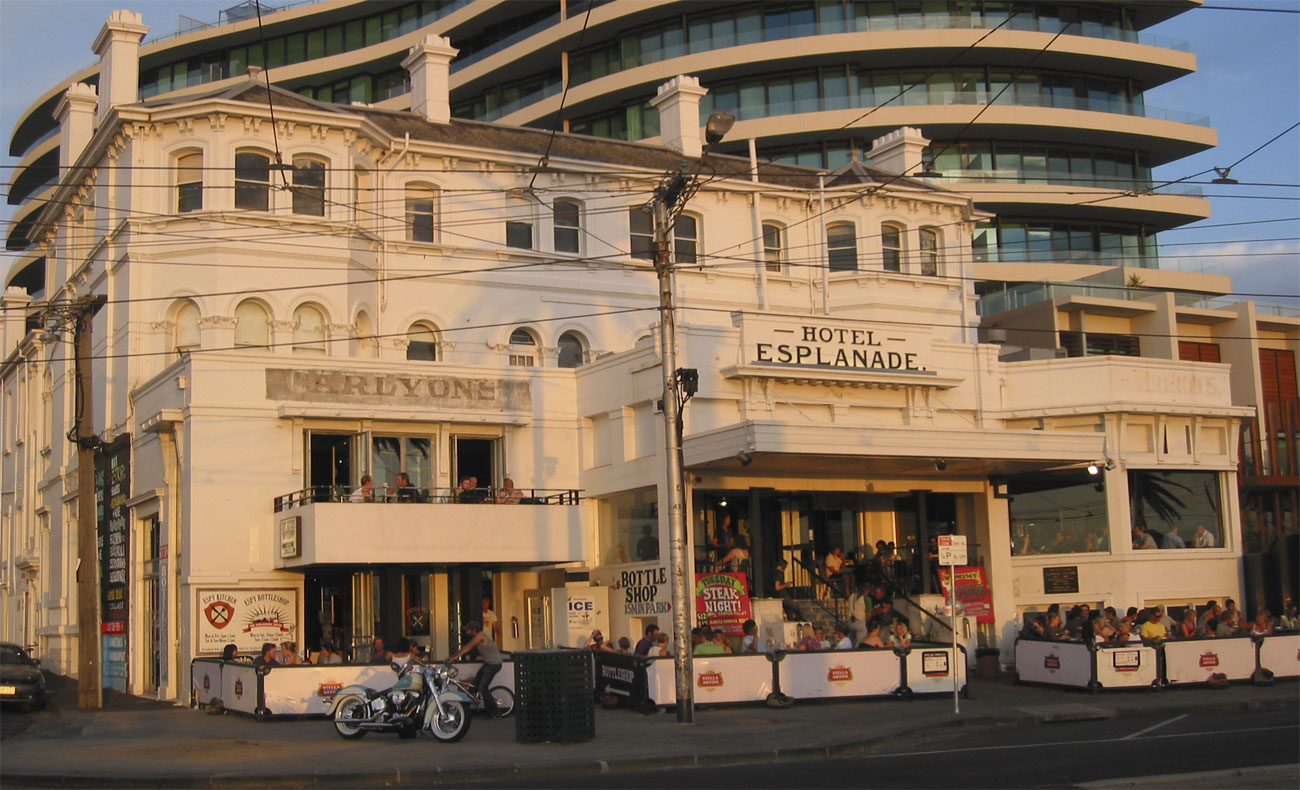 St.Kilda - Espy al calar del sole